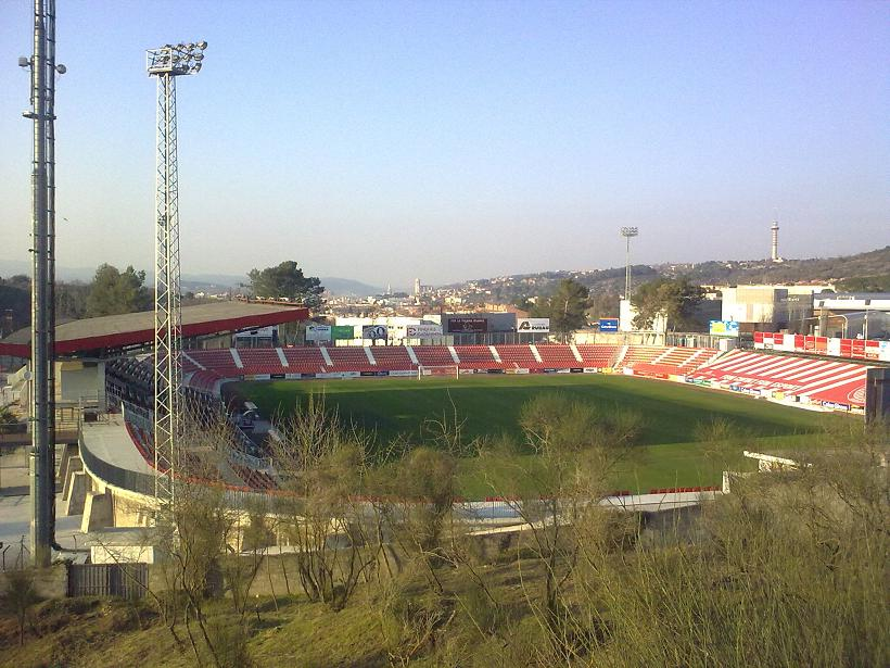 panoramica estadio montilivi